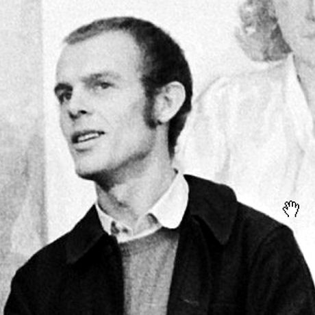 Dick Stapel, 1979